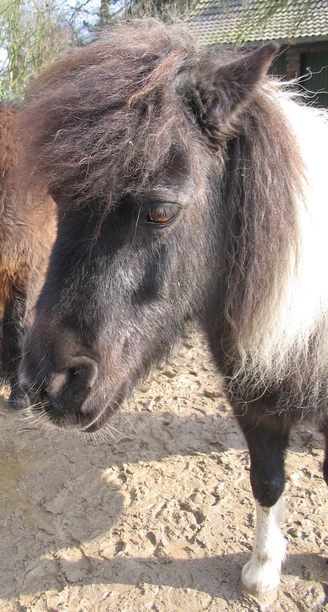 Beschreibung: Shetlandpony fotografiert im Krefelder Zoo. Quelle: Selbst fotografiert Fotograf oder Zeichner: JaKoMo 23:14, 4. Mär 2006 (CET)